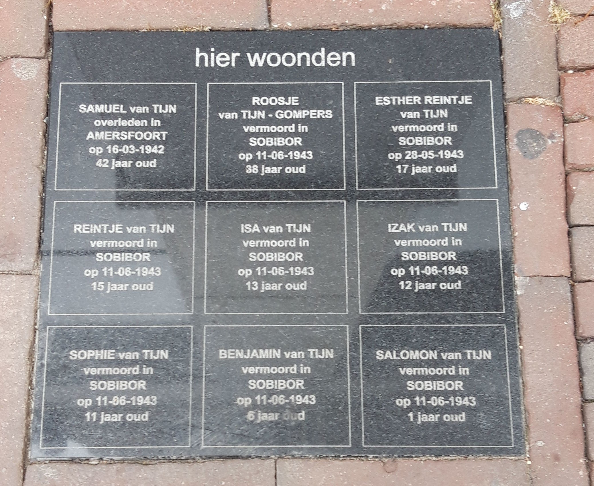 Namaak Stolpersteine in Amersfoort, Utrechtschestraat 3a